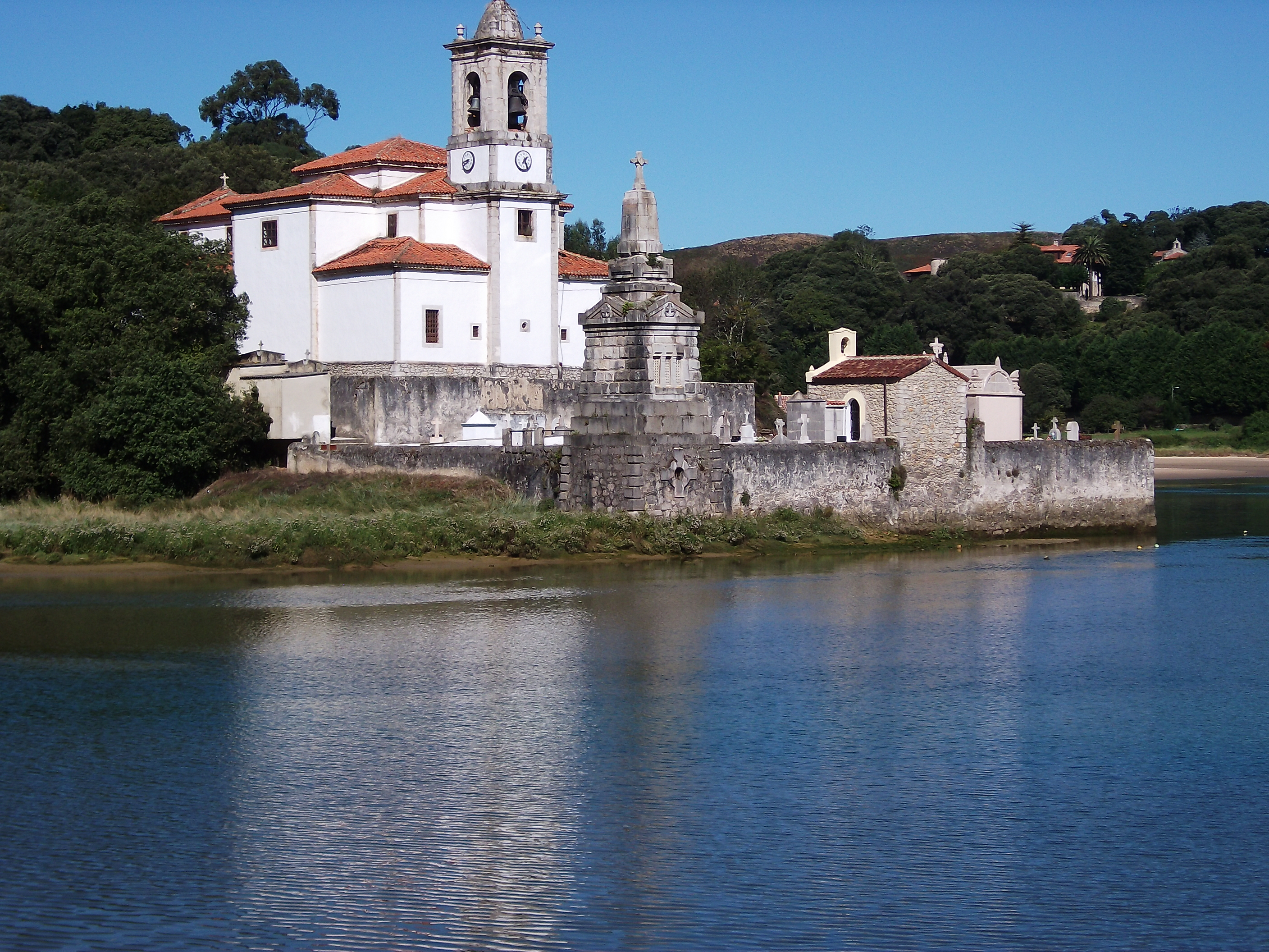 Situada en la ensenada de Barro, entre este municipio y el de Niembru (Asturias)